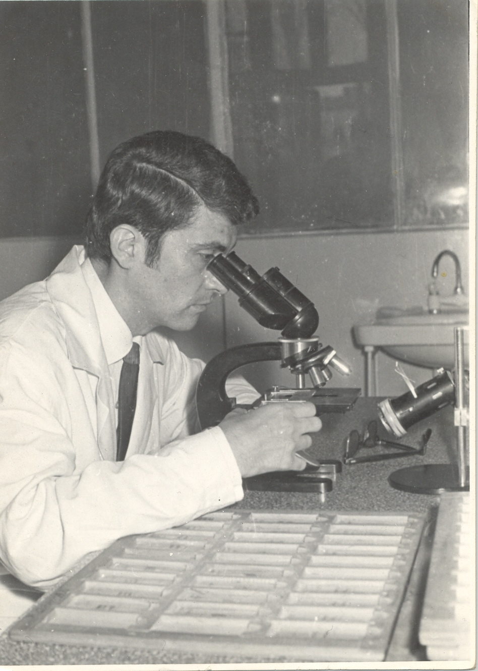 Labotarory